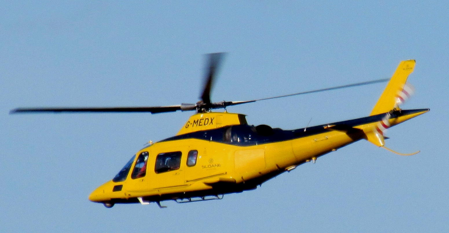 G-MEDX